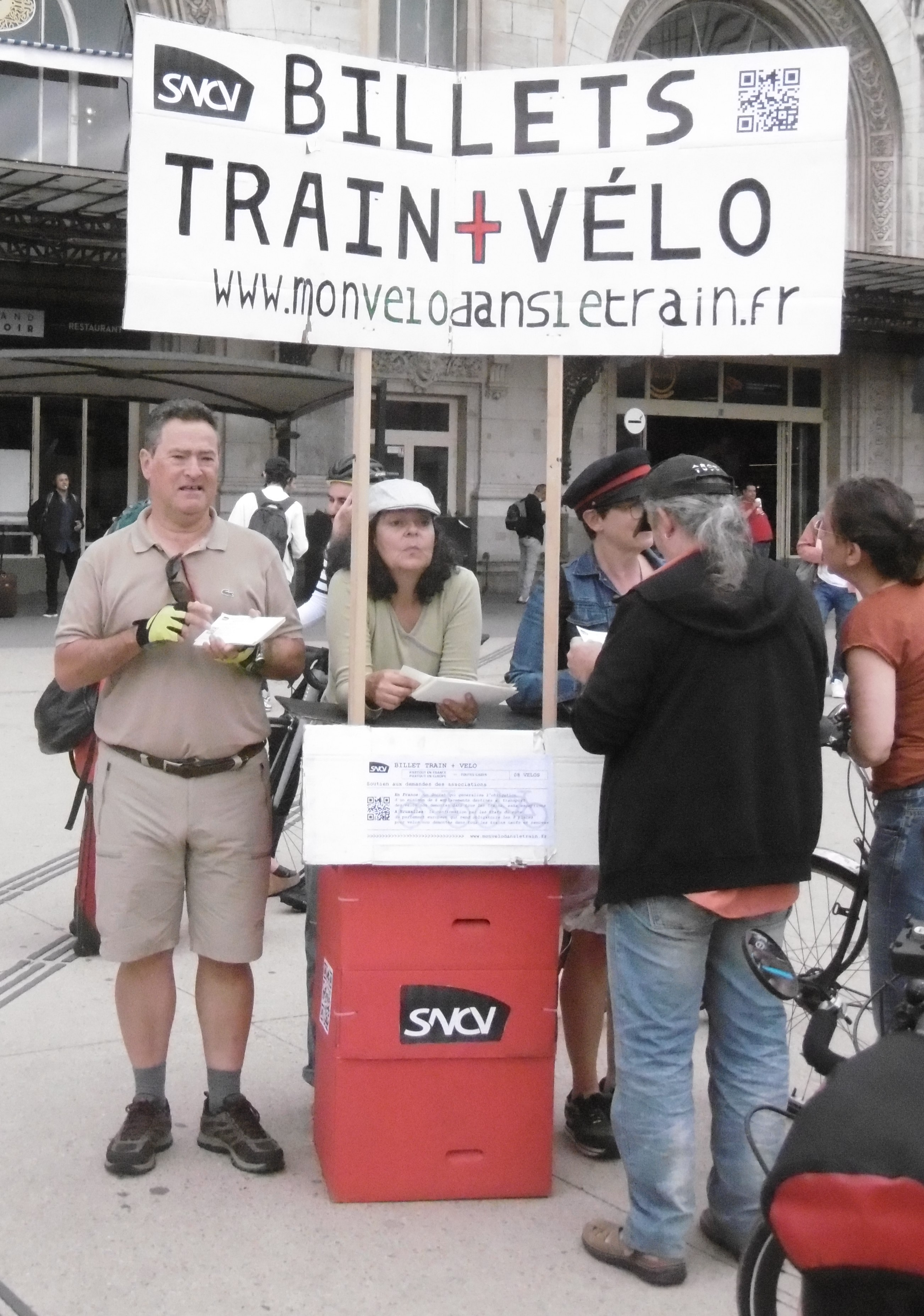 Manifestation du 4 juillet 2020 pour obtenir 8 places-vélo dans chaque train